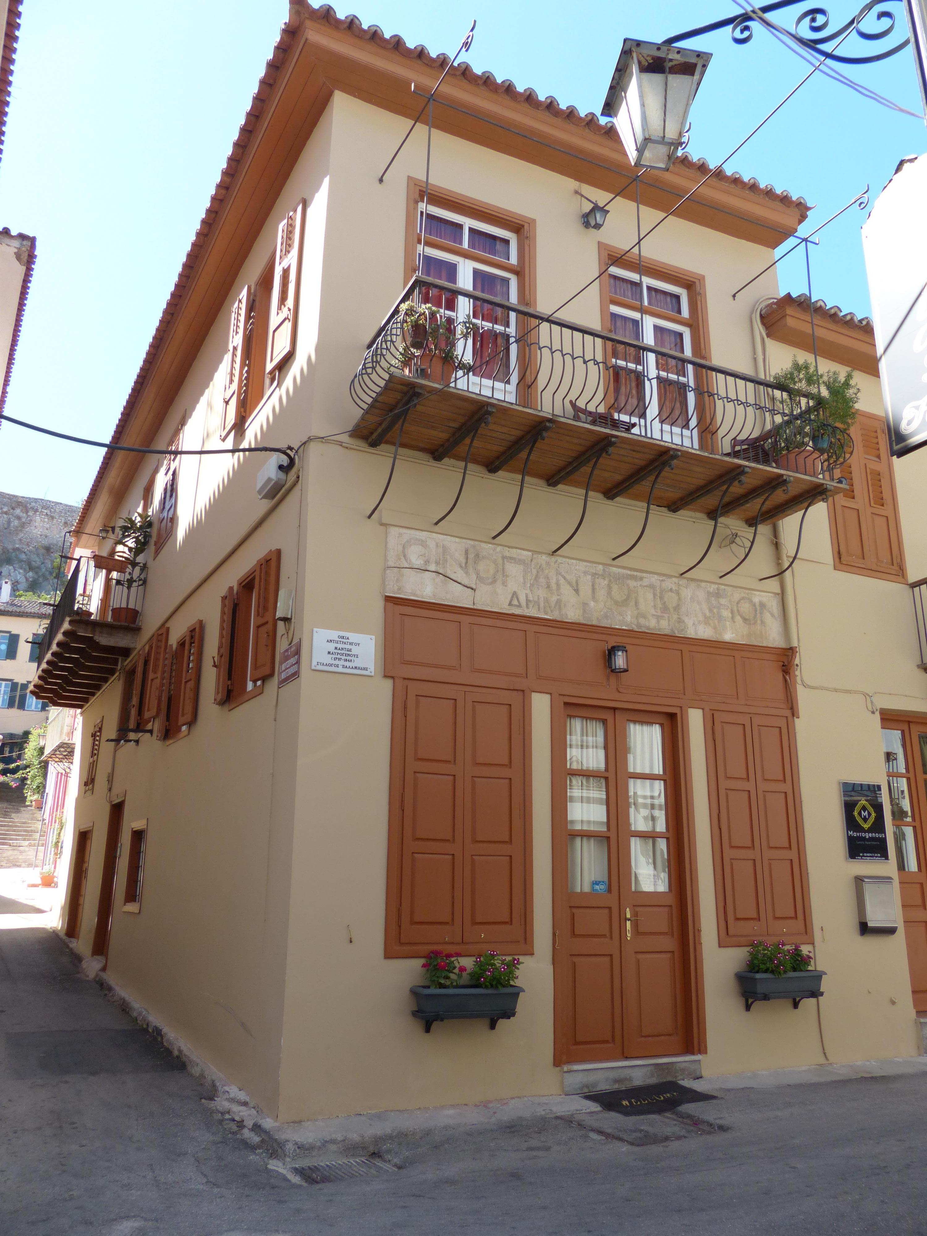 Nauplie (Grèce). Maison au coin de la rue Papanikolaou et de la rue Moutzouridou. Plaque commémorative en grec indiquant que la maison a été habitée par Manto Mavrogenous, héroïne de la guerre d'indépendance grecque ; la plaque porte les dates 1797-1848 et non 1796-1848.